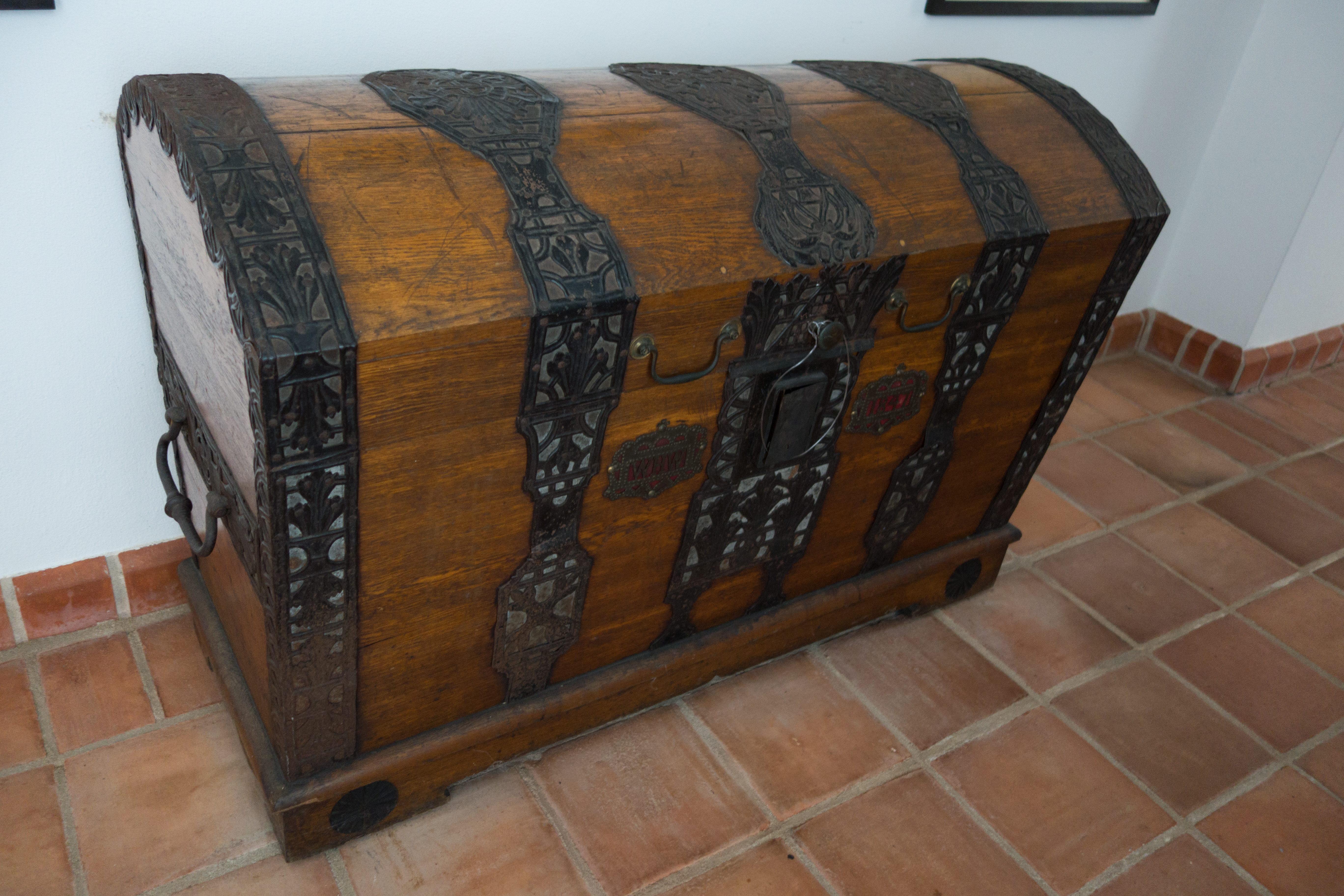 Schloss Oranienburg, Koffertruhe, 1847